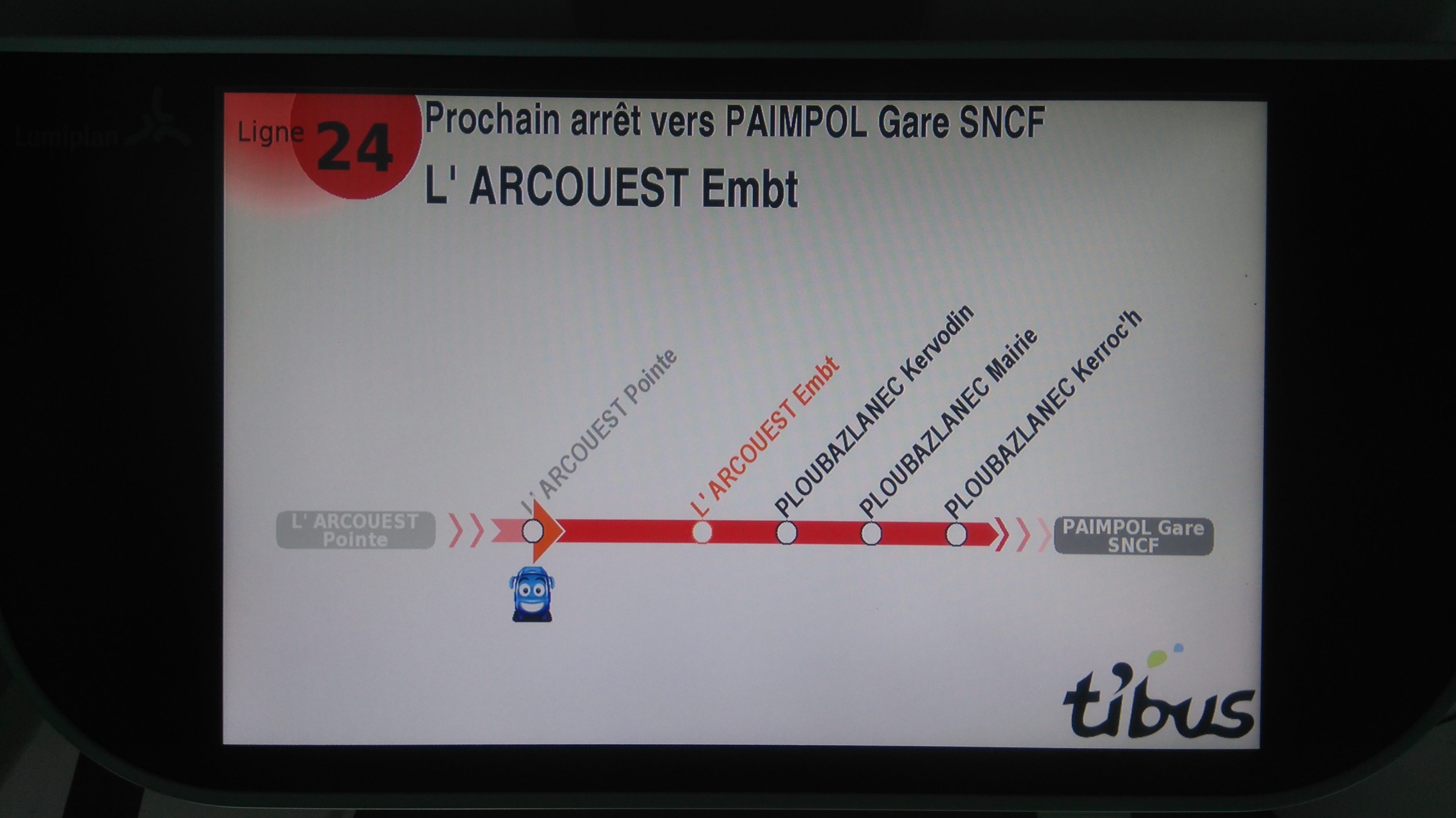 Ecran Ti'Bus